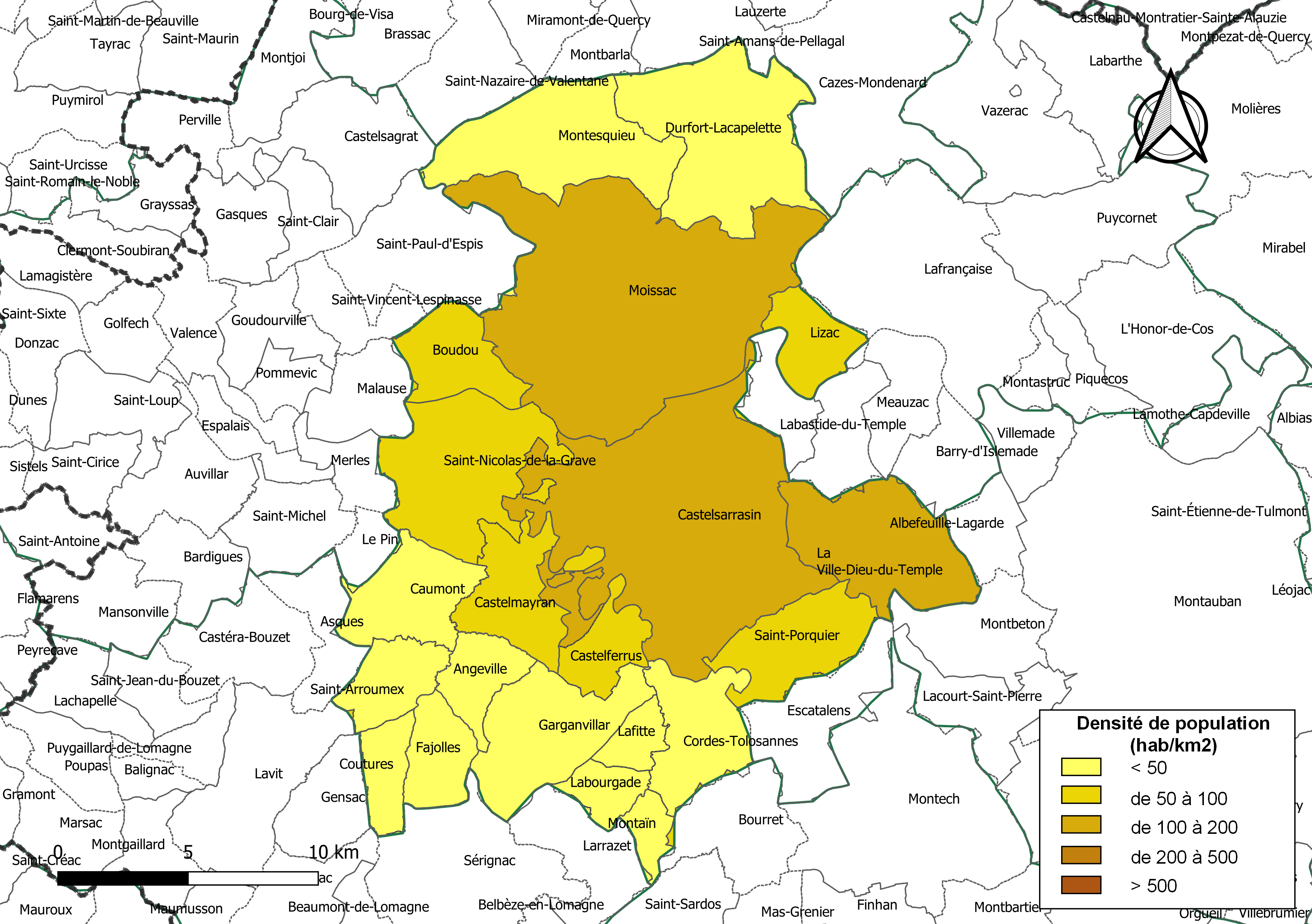 Carte des densités de population (millésimée 2016) des communes de la Communauté de communes Terres des Confluences, département de Tarn-et-Garonne, France. Composition au 1er janvier 2019.